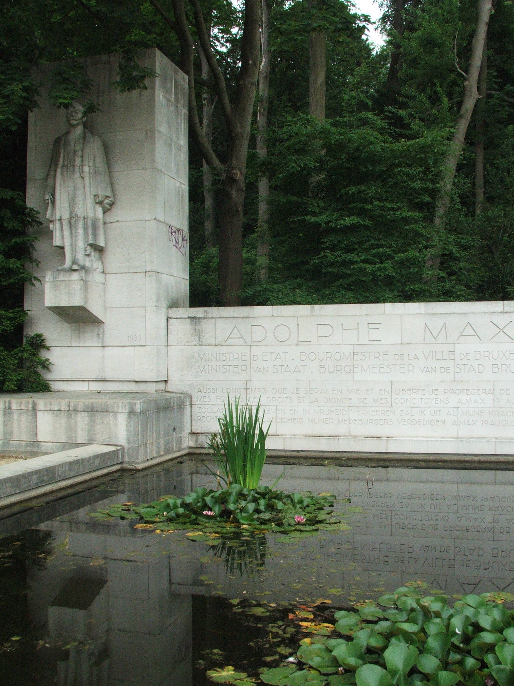 Park of Osseghem in Laeken (Brussels) Belgium